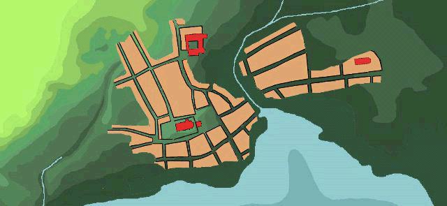 Rekonstruerad karta över Ystad på 1300-talet.